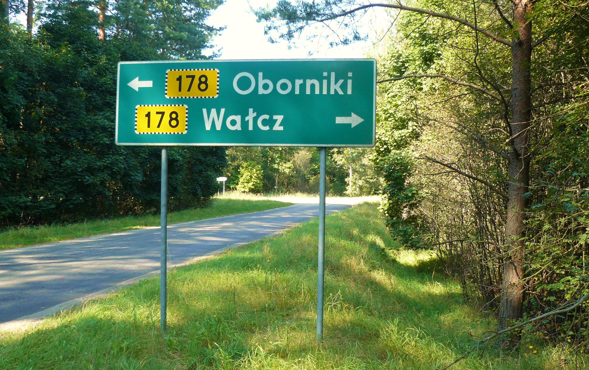 Draoga nr 178 koło Trzcianki.